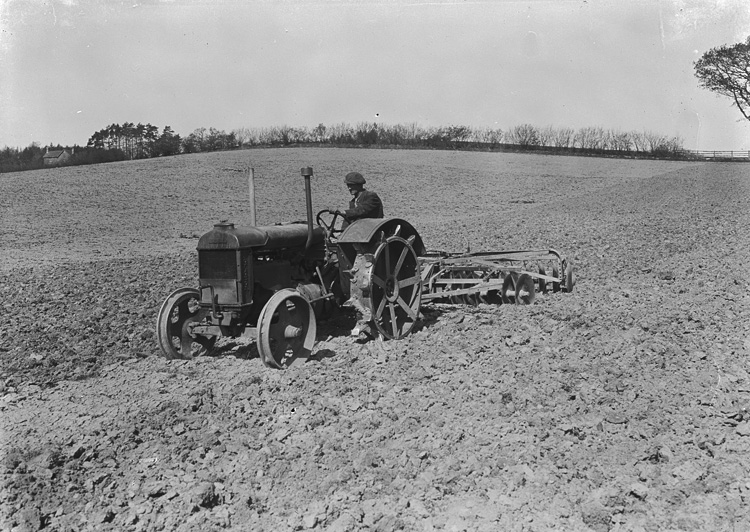 Ffotograffydd/Photographer: P B Abery (1877?-1948) Note/Nodyn: Man harrowing on Fordson tractor with disk harrow. Dyddiad/Date: [194-?] Cyfrwng/Medium: Negydd gwydr / Glass negative Maint/Dimensions: 119 x 163 mm. Cyfeiriad/Reference: PBA19/6 Rhif cofnod / Record no.: 4460641 Rhagor o wybodaeth am gasgliad P B Abery yn Llyfrgell Genedlaethol Cymru More information about the P B Abery Collection at the National Library of Wales